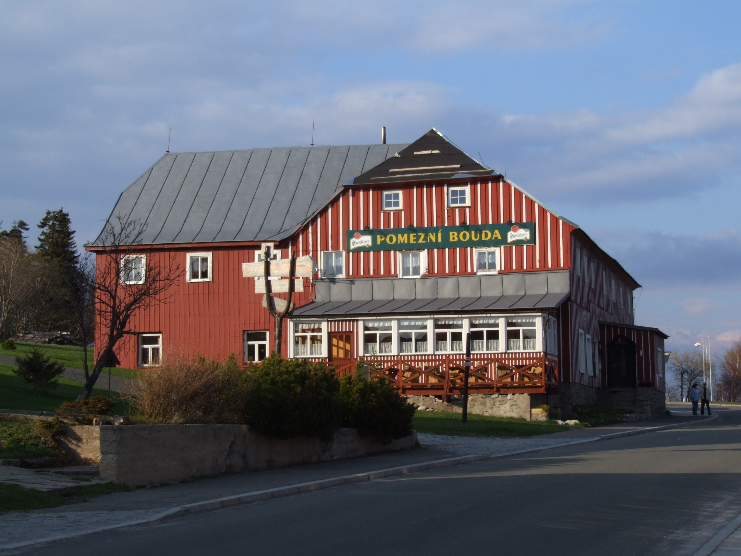 Pomezní bouda (Blaschkebaude, Goderbaude) - mountain hostel in Malá Úpa, Riesengebirge (Karkonosze), Czech Republic